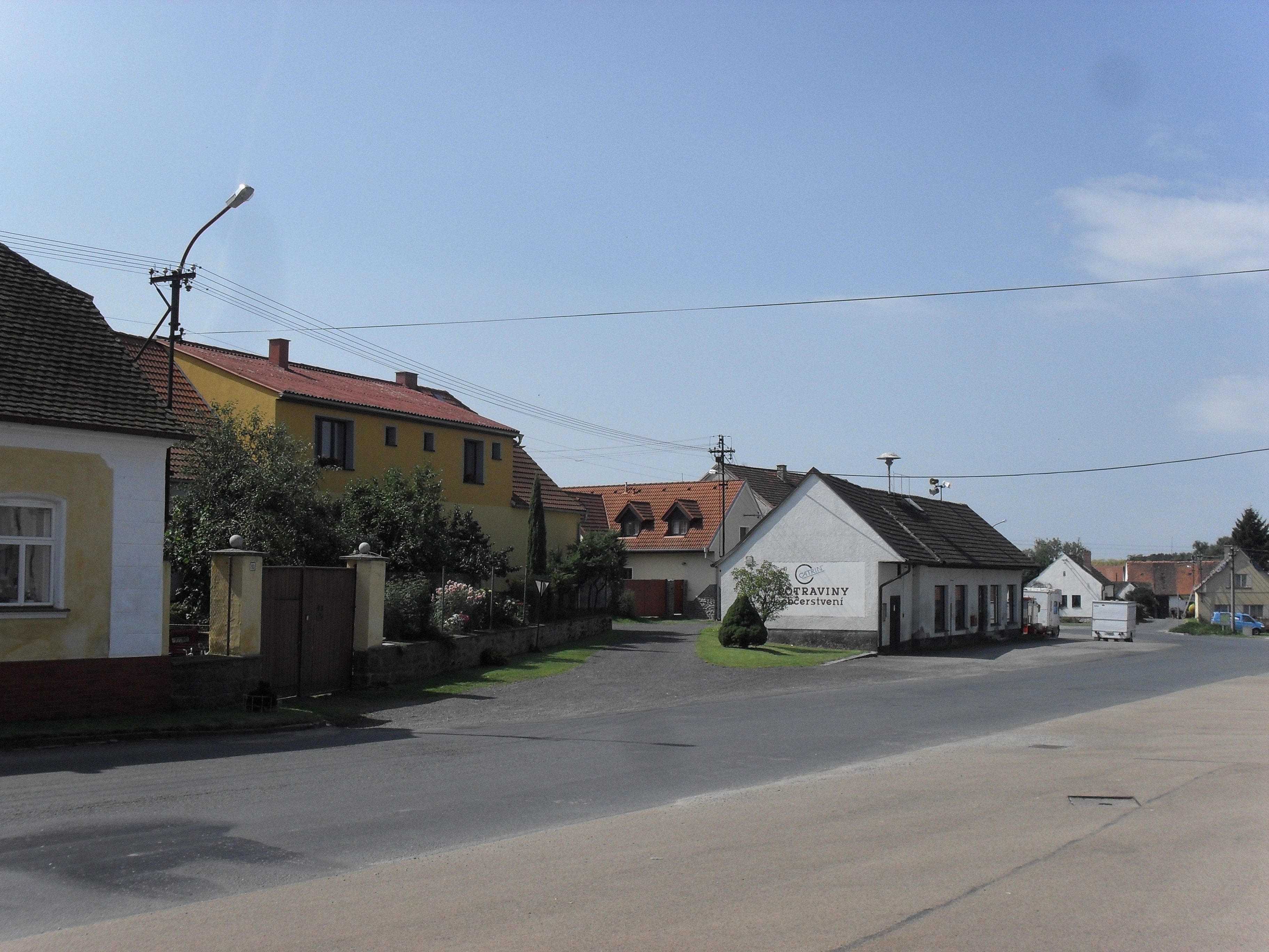 Fotografie pořízena v obci Svéradice.